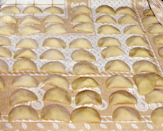 Preparing italian Ravioli